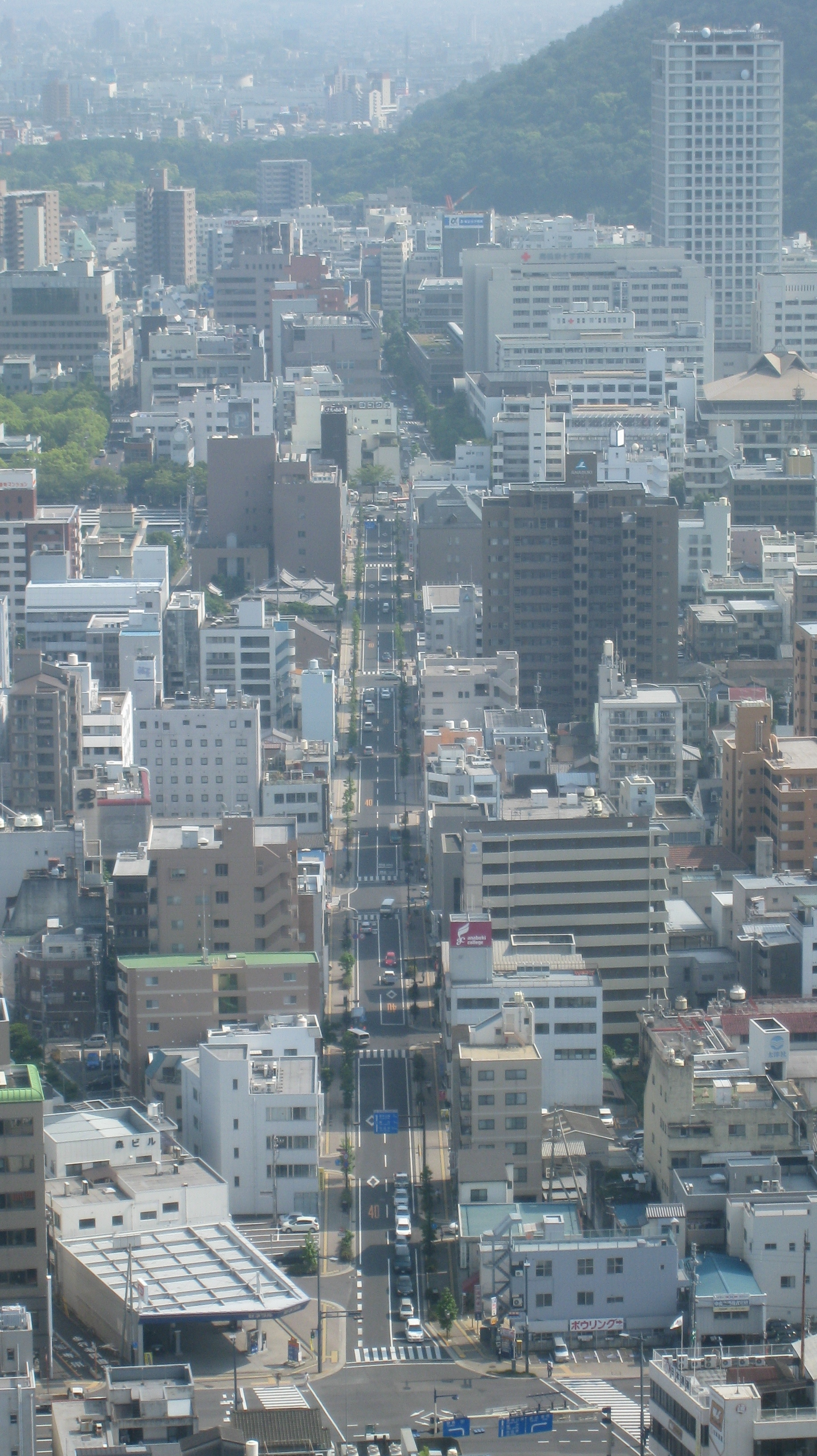 高松シンボルタワーから県庁通りを見る